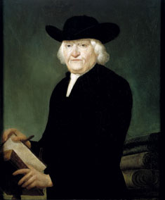 De doopsgezinde voorganger Wolter ten Cate (1701-1796) door Frans Menninghuysen ca. 1792 Olieverf op doek, 90 x 75 cm (95 x 80 cm met lijst)